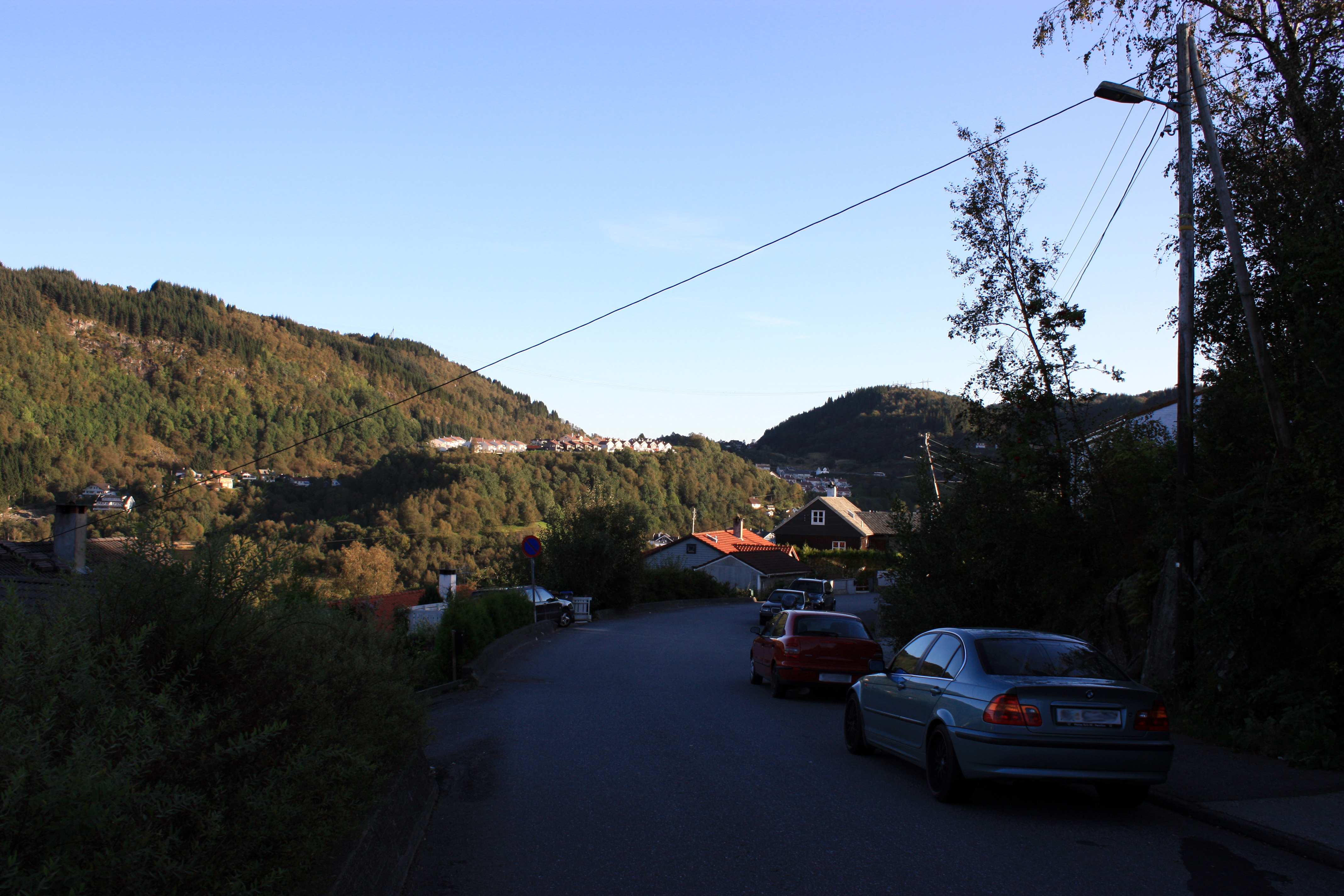 Sørlia, Fana, Bergen.